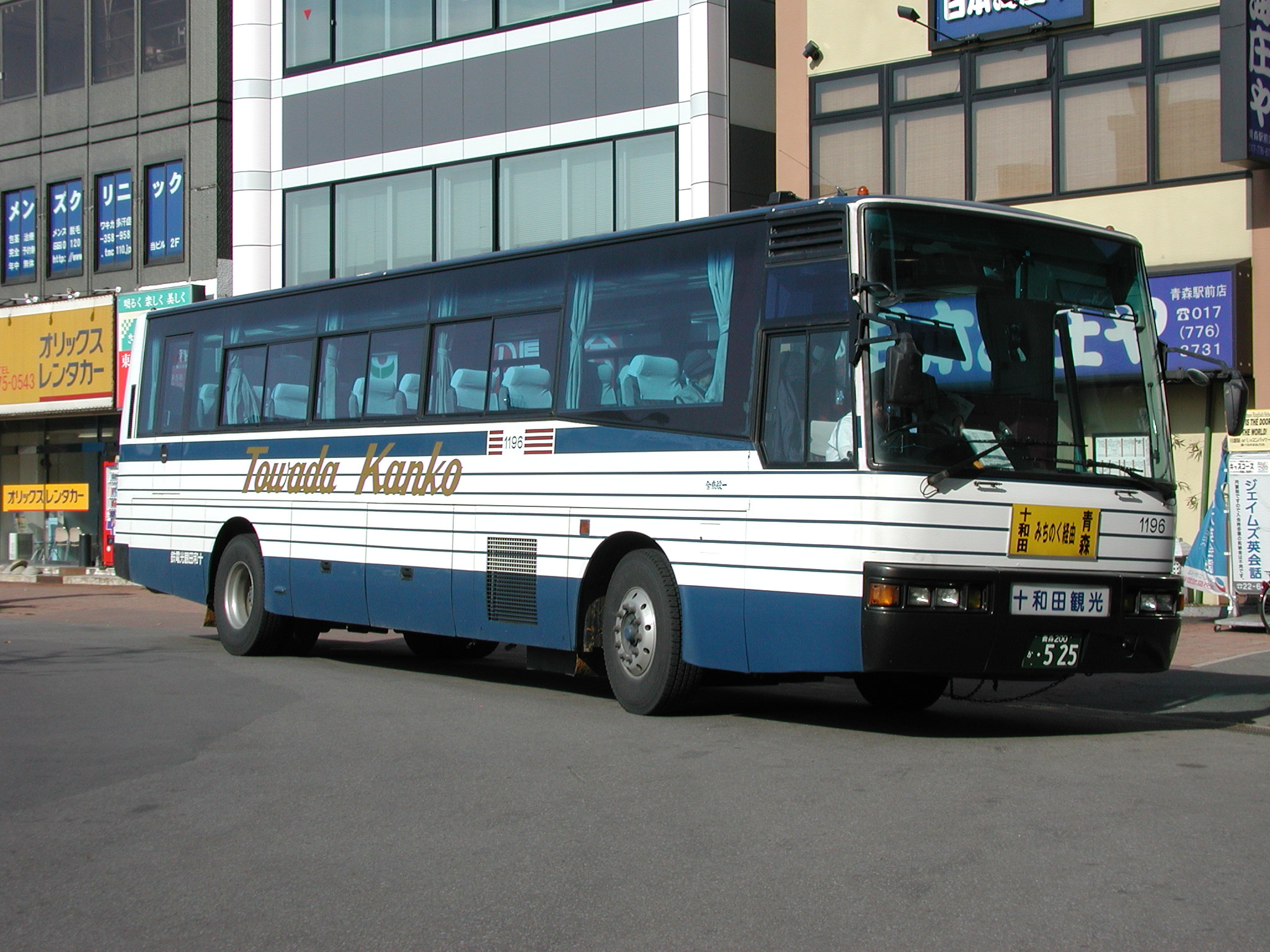 十和田観光電鉄バス 観光貸切塗色（いすゞ・スーパークルーザー：P-LV719R）青森駅にて